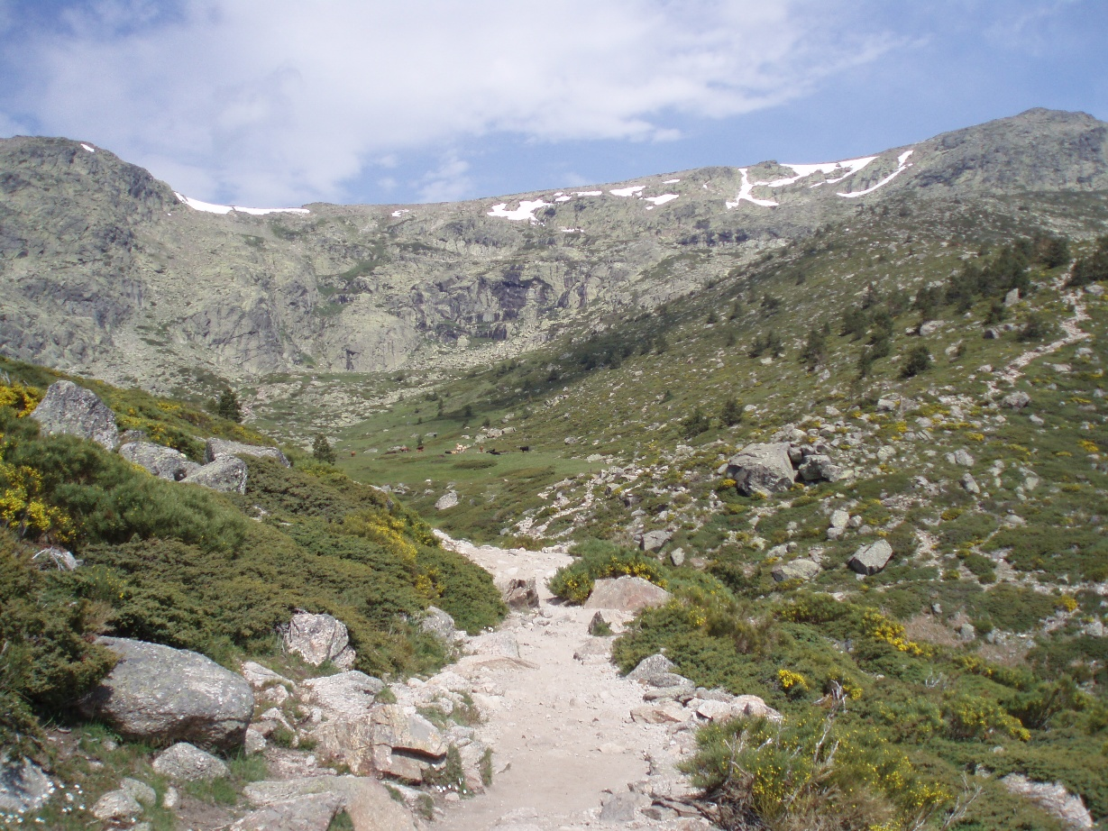 Circo glaciar de Peñalara, ubicado en la Comunidad de Madrid (España).